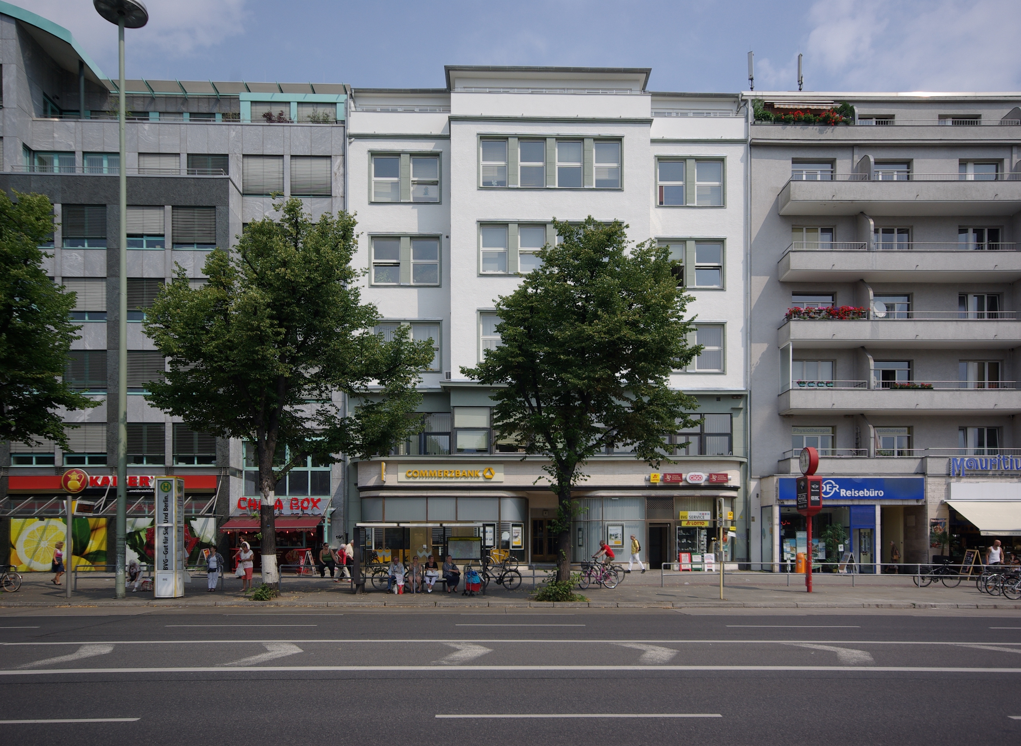 Berlin-Westend. Das Haus Thoedor-Heuss-Platz 4 unter Denkmalschutz.